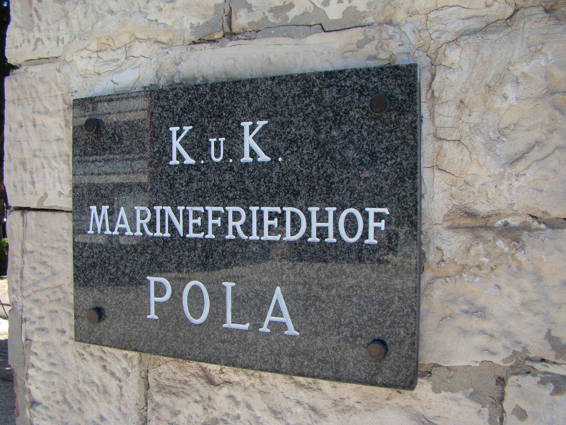 C. i kr. mornaričko groblje u Puli